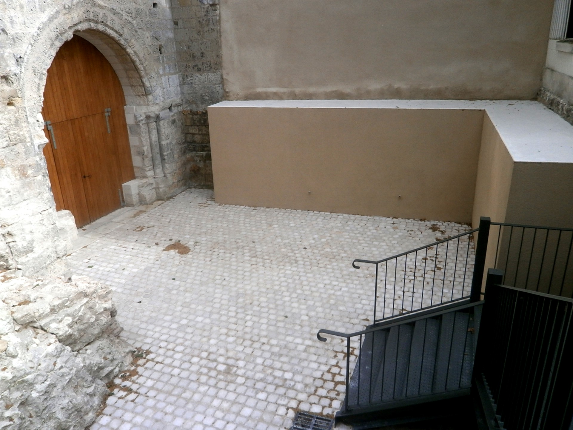 Vue plongeante du parvis aménagé de la chapelle.